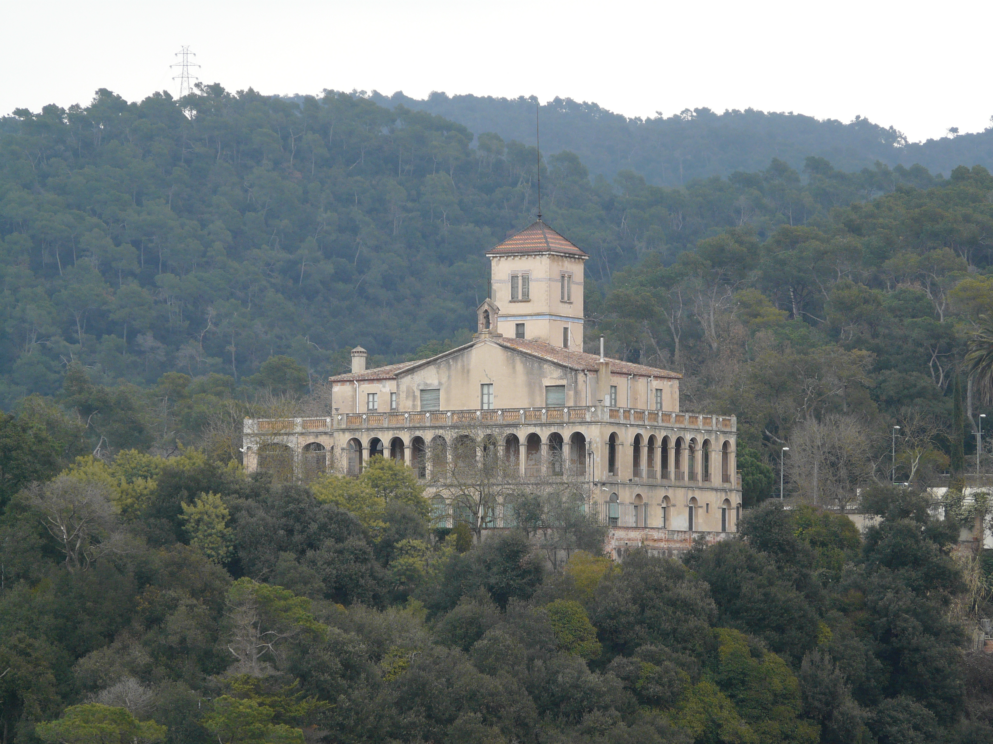 Vil·la Joana (Barcelona) Object location41° 25′ 11.24″ N, 2° 05′ 59.6″ E